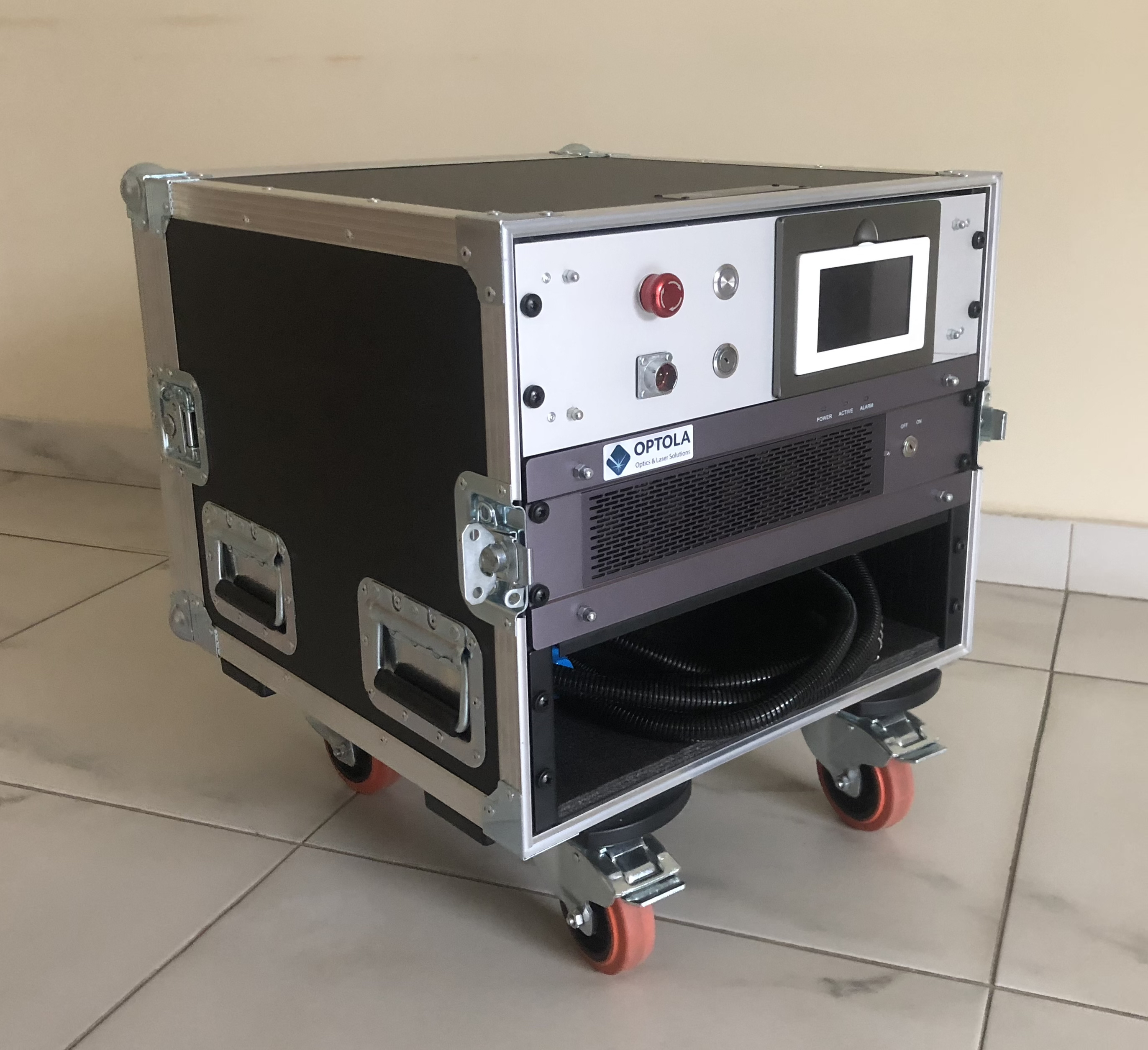 Kompaktiška 200W lazerinio valymo įranga.